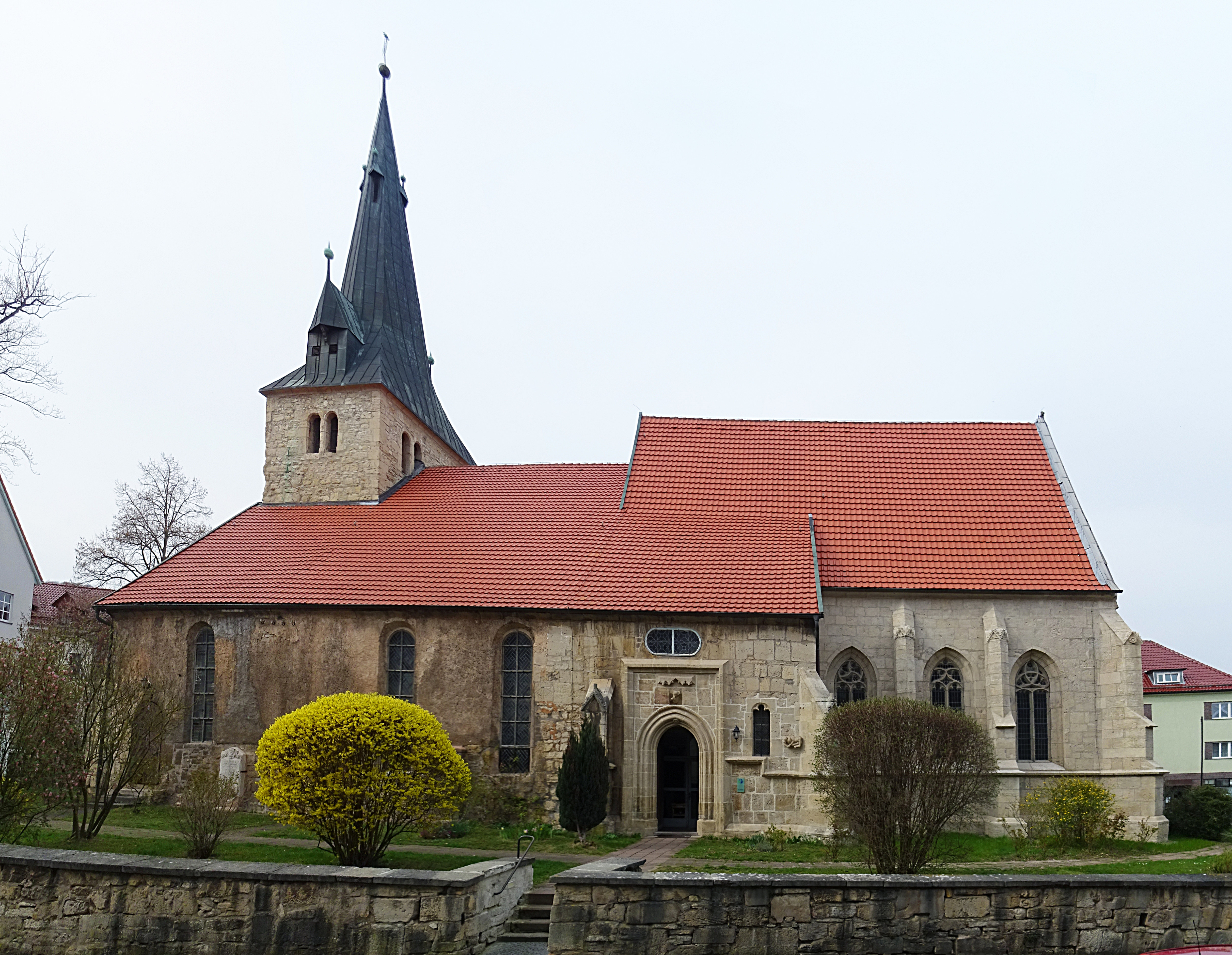 die Kirche St. Marien in Bleicherode war die „KiBa-Kirche des Monats Januar 2018“